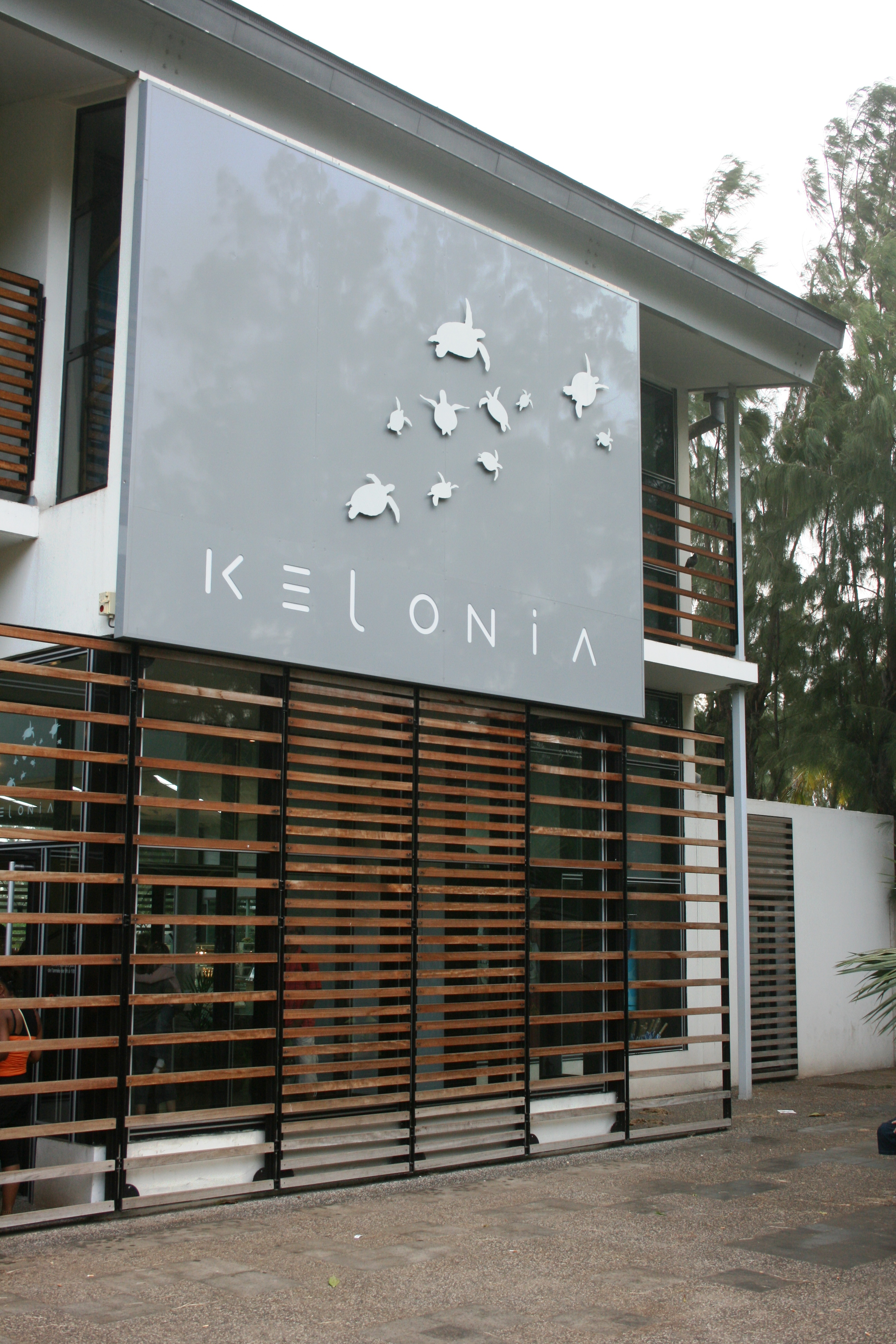 L'entrée de Kélonia à Saint-Leu de la Réunion